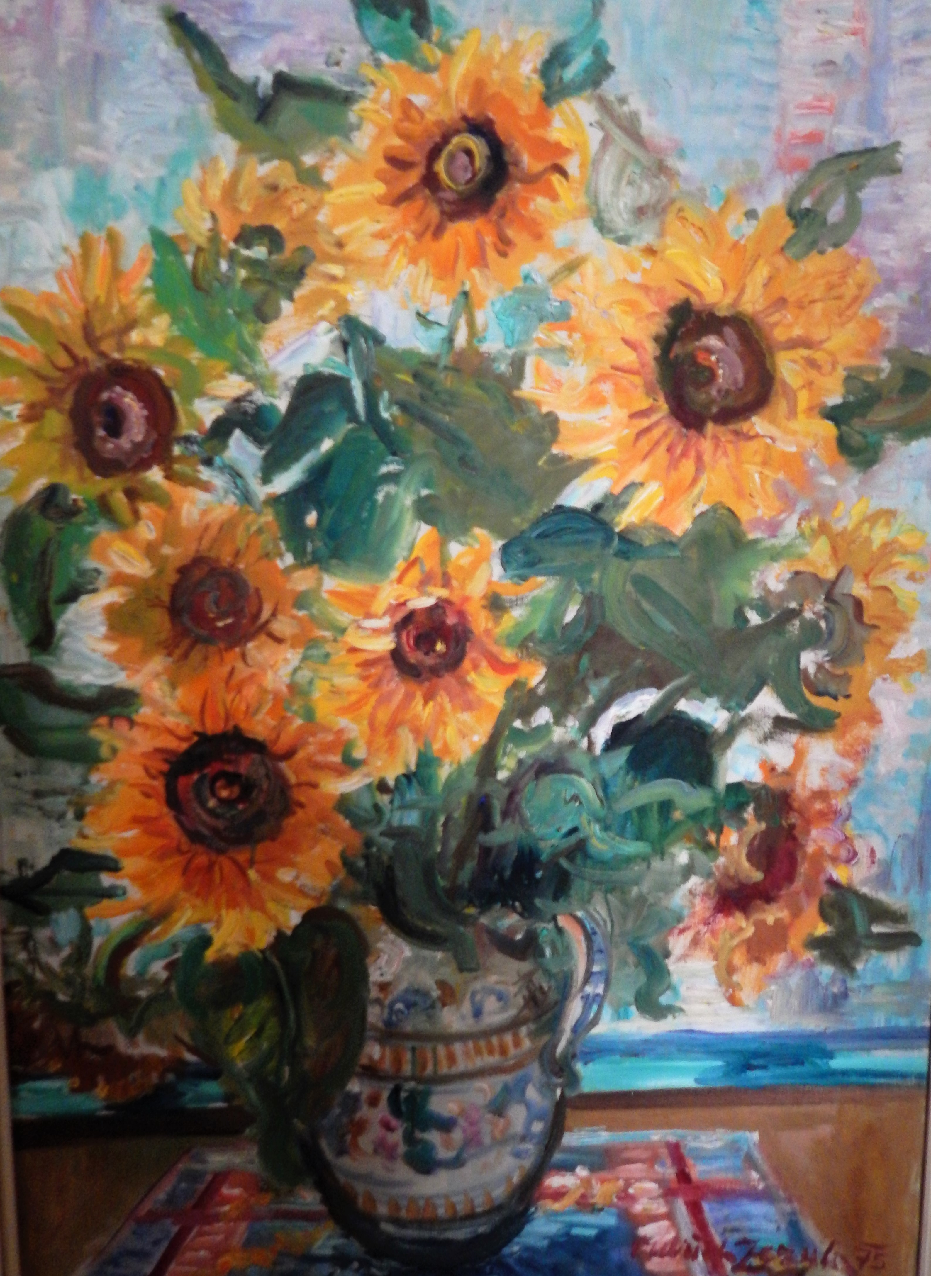 obraz kytice slunečnic (olej na plátně)